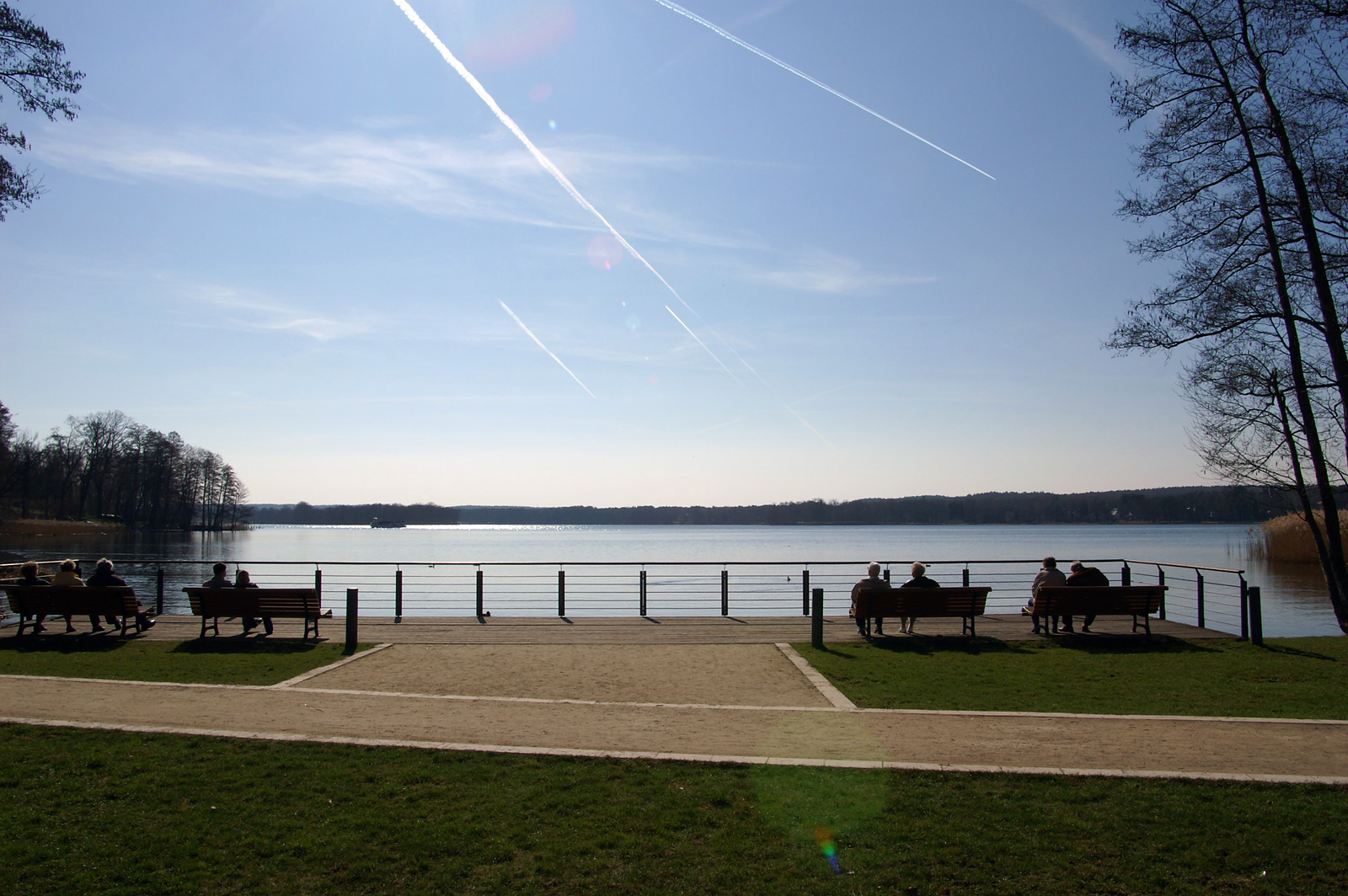 Scharmützelsee in Bad Saarow, Deutschland.